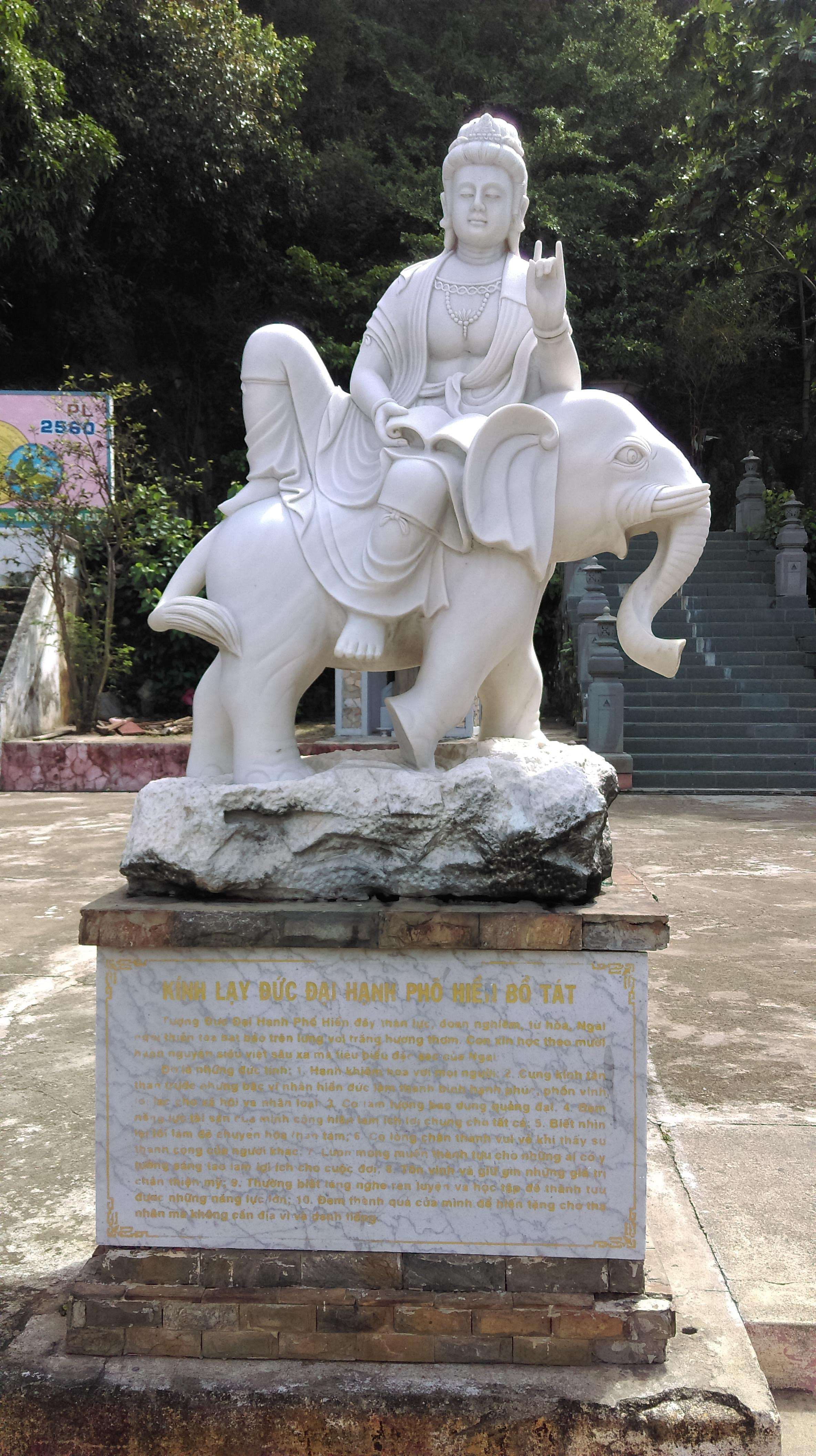 Bồ Tát Phổ Hiền, chùa Quán Thế Âm, Đà Nẵng